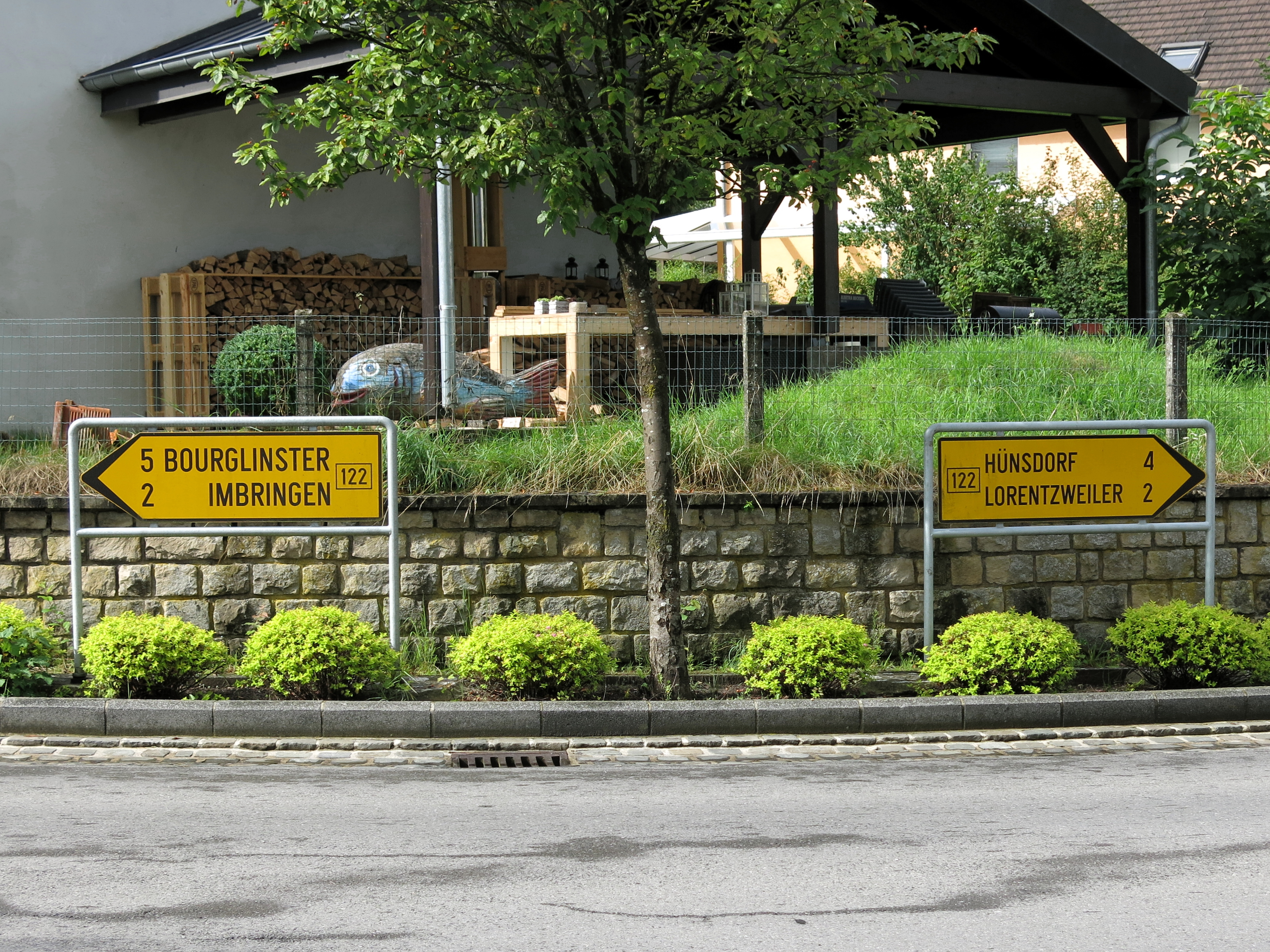 Schëlter zu Blaaschent op der Kräizung CR122 / CR125.